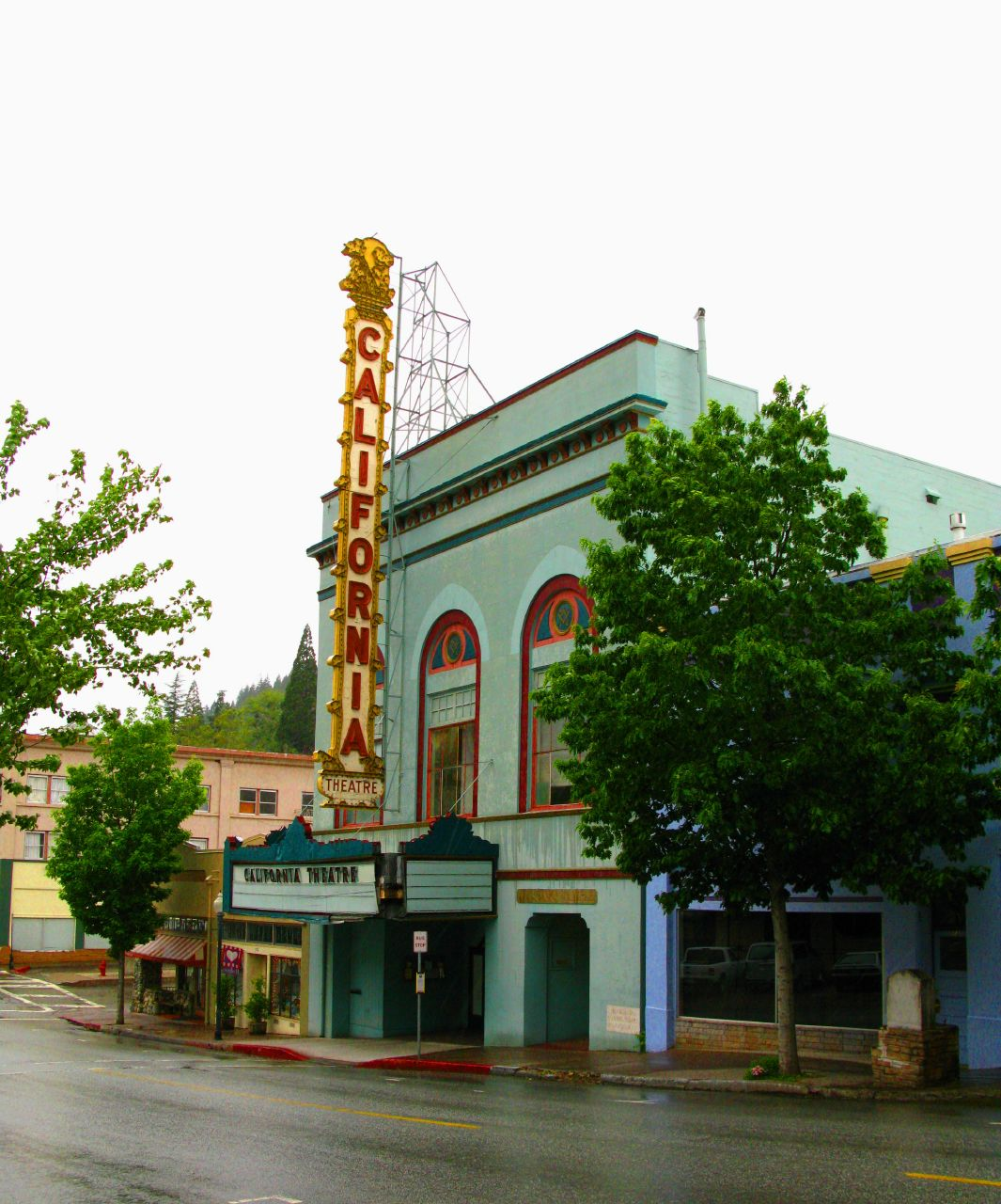 Dunsmuir, CA